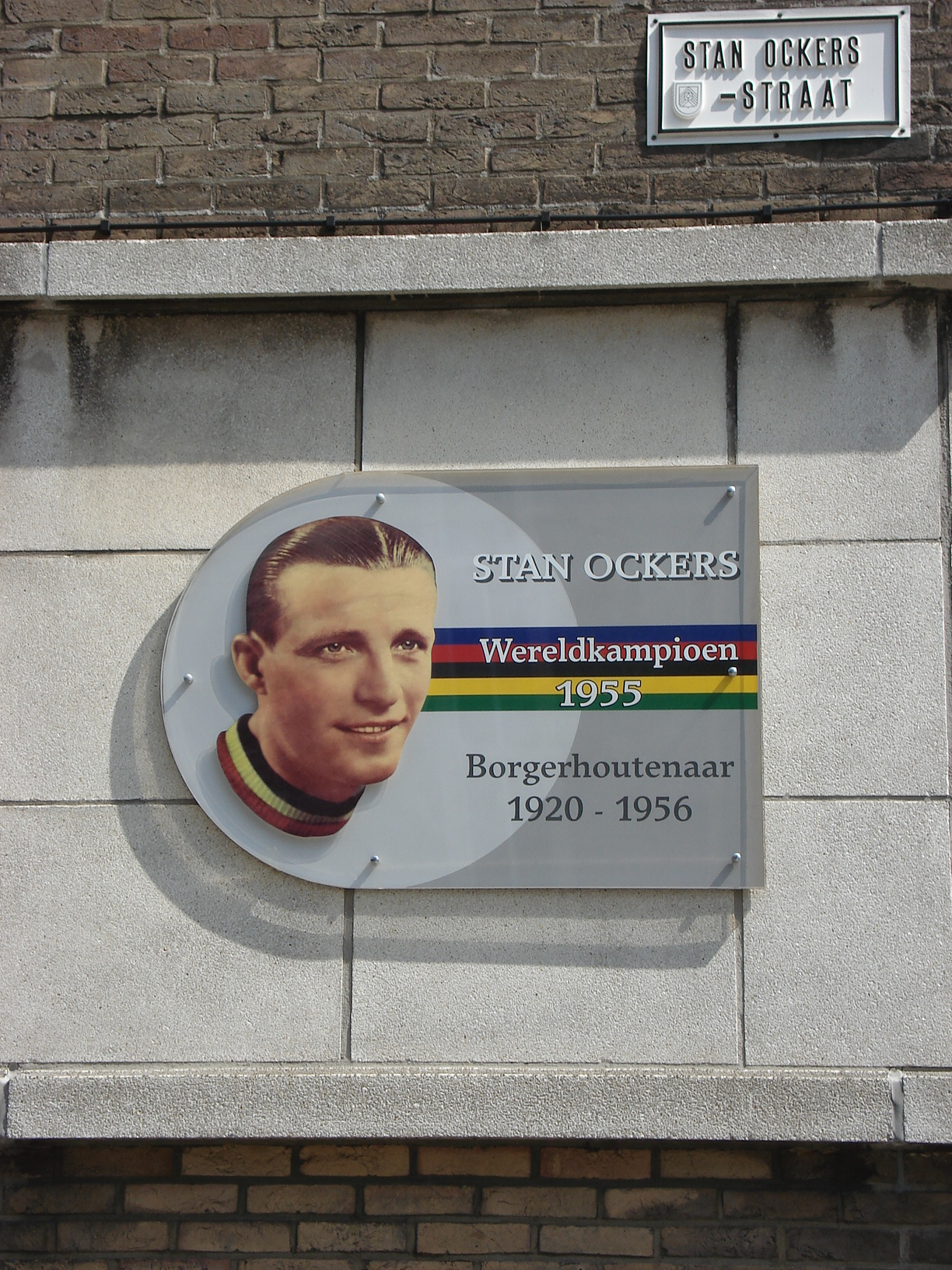 Borgerhout (deelgemeente Antwerpen), gedenkplaat aan wielerkampioen Stan Ockers, aangebracht in 2006.